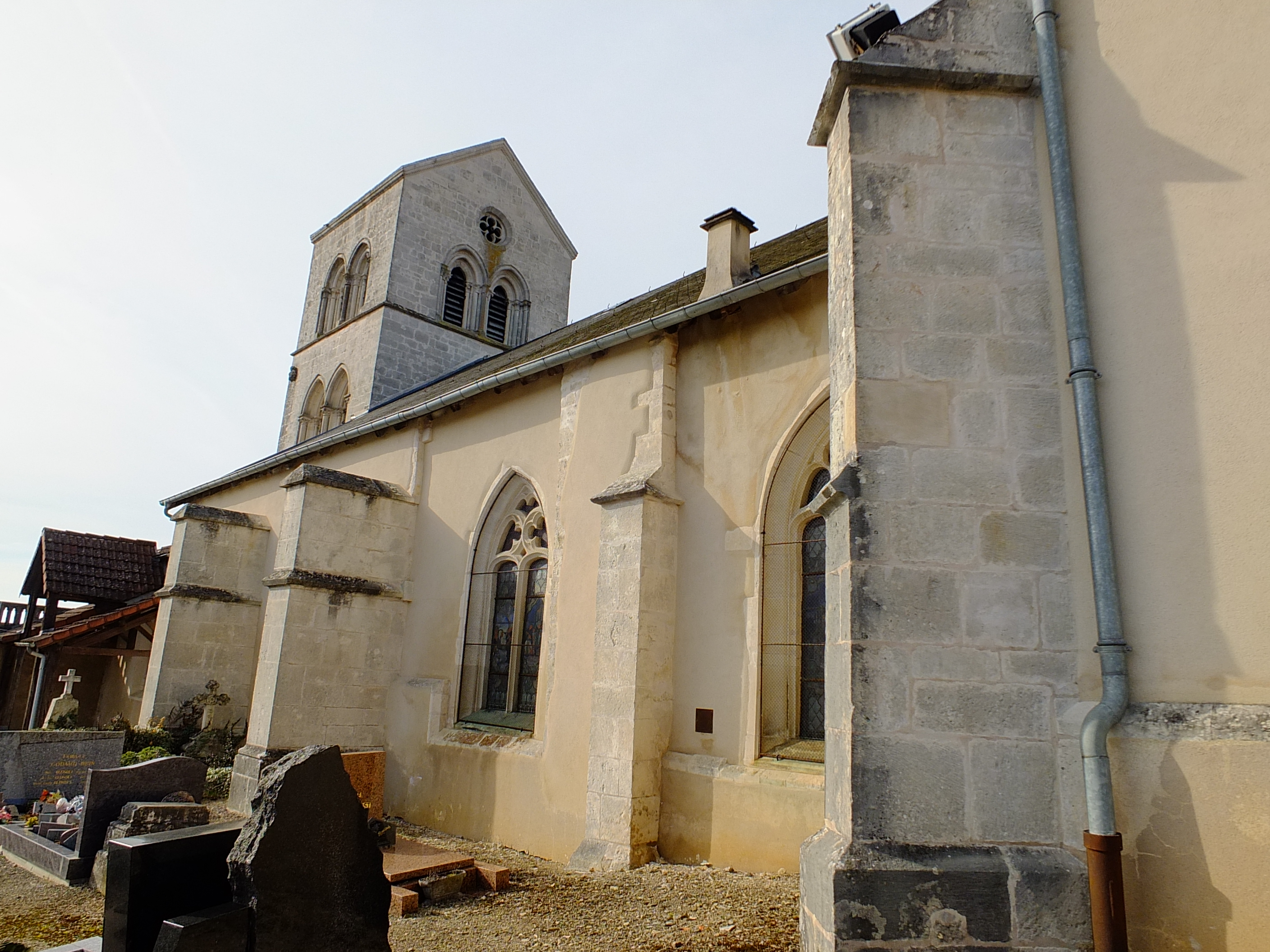 Église Saint-Élophe de Soulosse-sous-Saint-Élophe (Vosges, France).